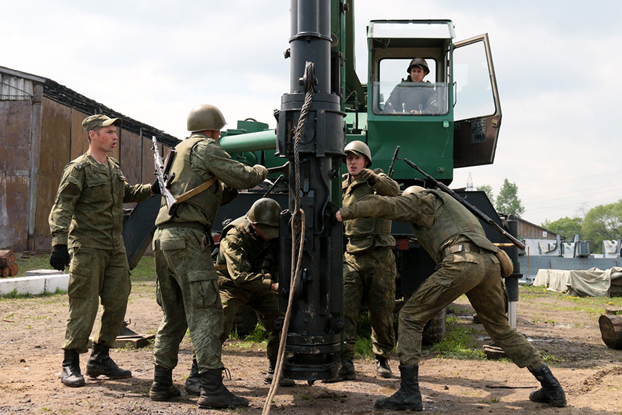 Копёрный агрегат «УКА».